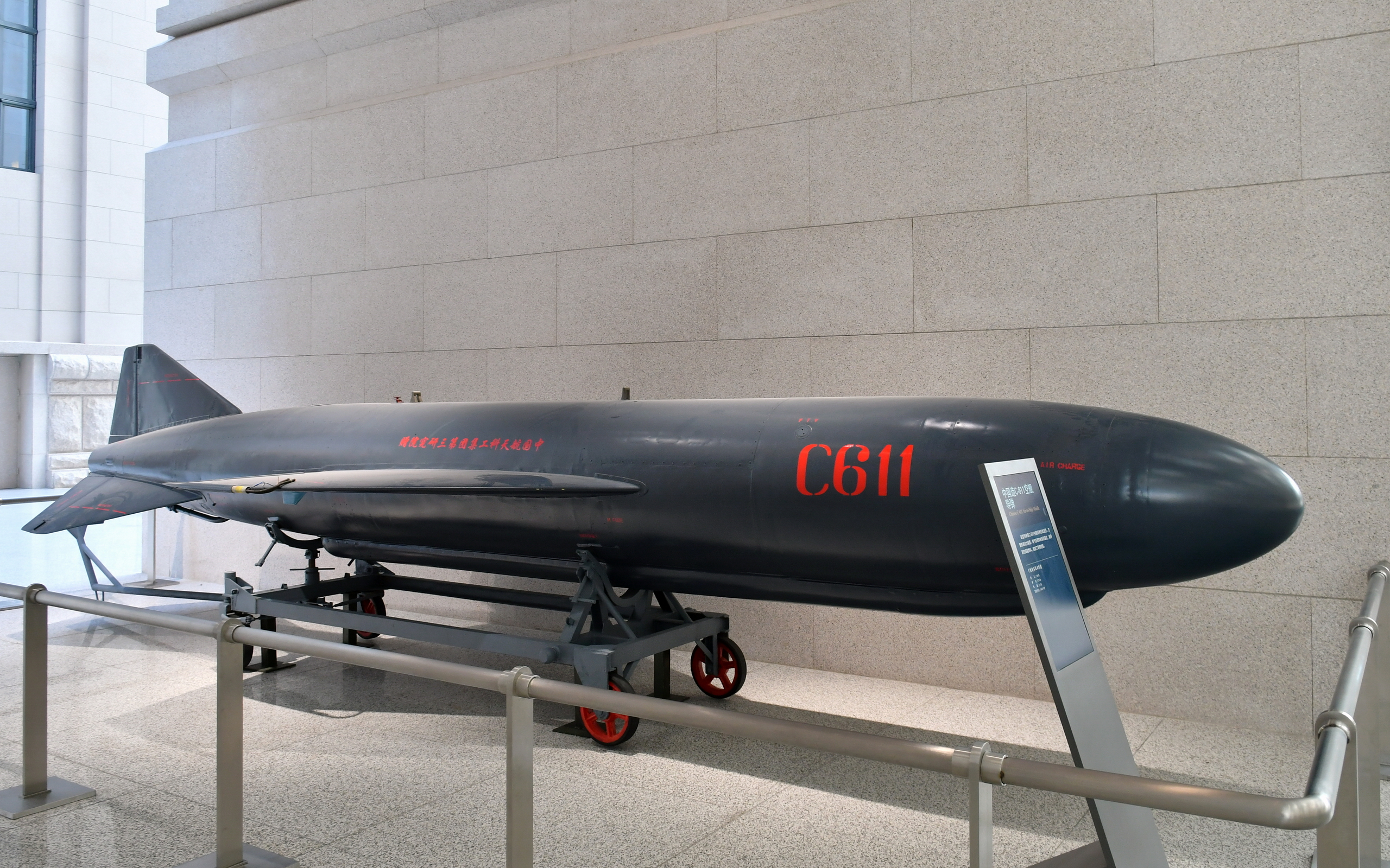 C-611 空舰导弹，是C-601空舰导弹的改进型号，拍摄于中国人民革命军事博物馆。